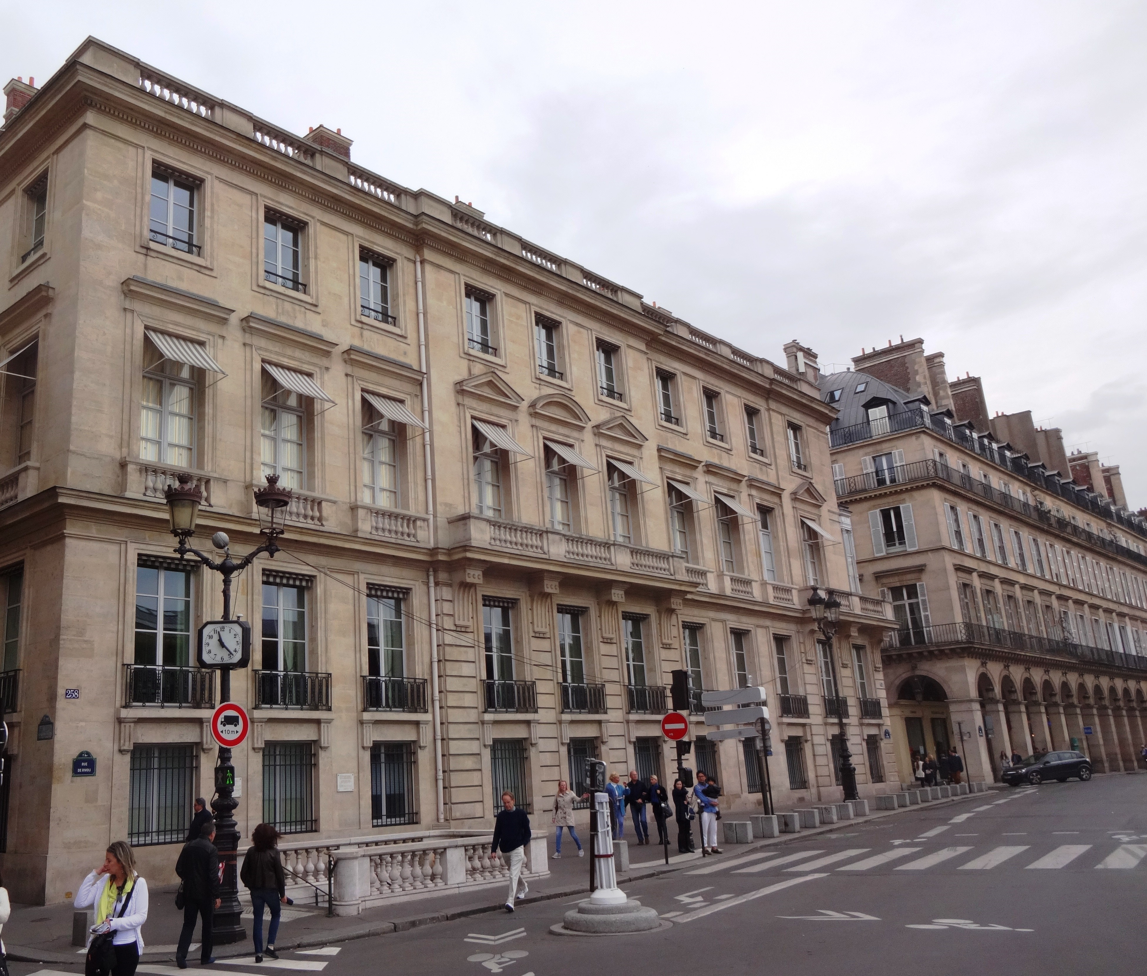 Verwaltungssitz Marshallplan, 1947-52, nördlicher Rand Place de la Concorde, Paris